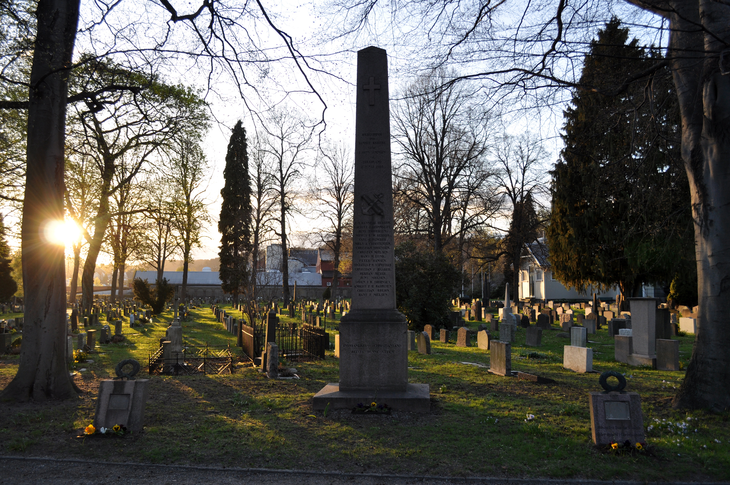 Norsk (bokmål): Kristiansand kirkegård